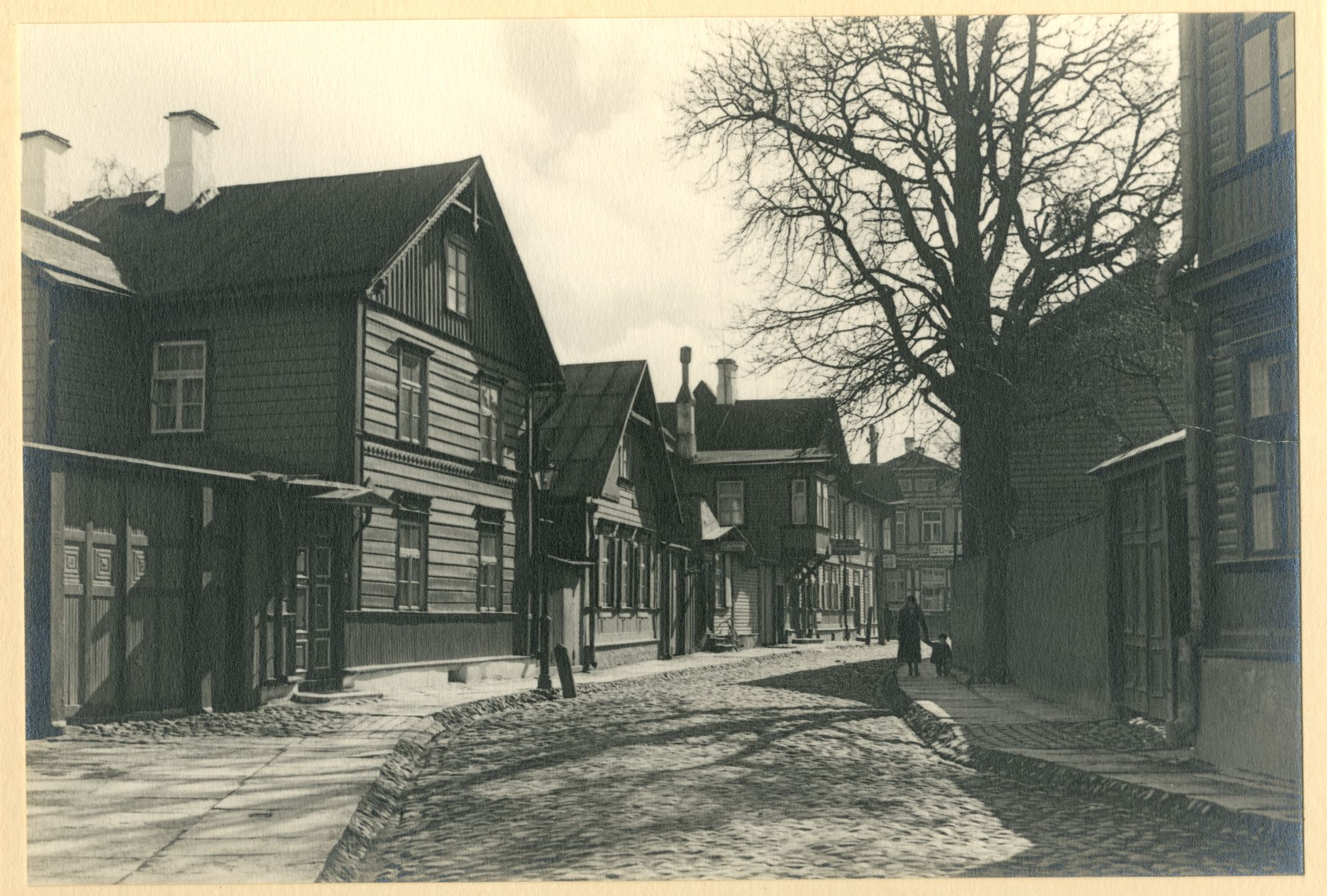 Tatari tn 29-31